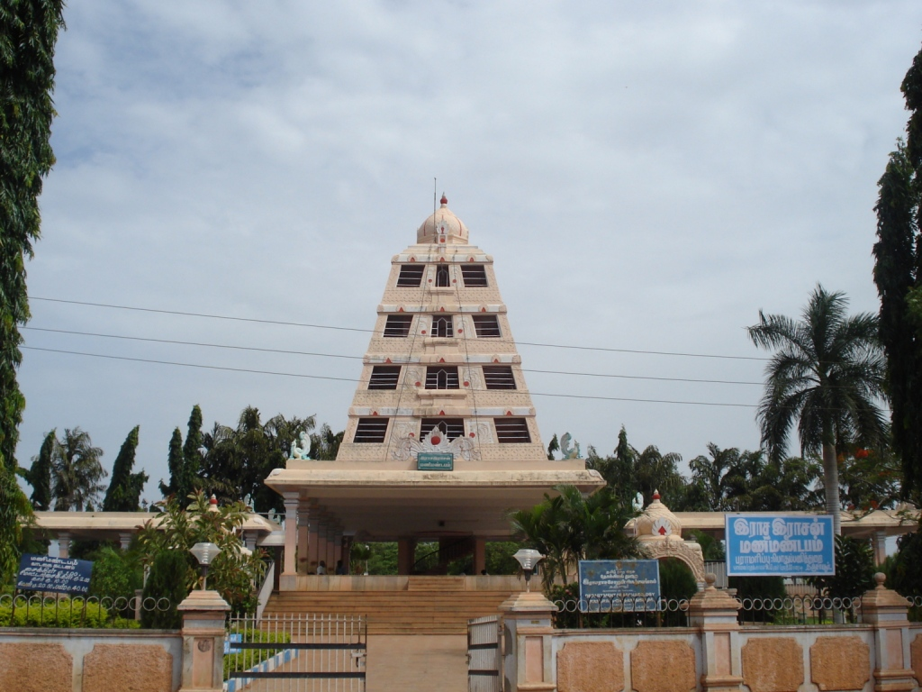 മണിമണ്ഡപം, തഞ്ചാവൂർ